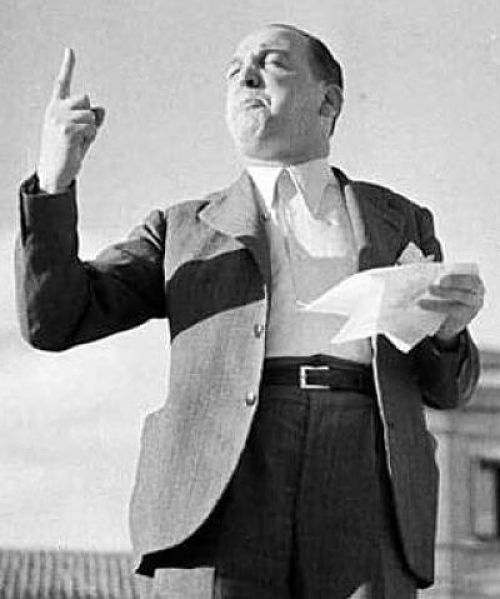 Melchor Rodríguez García (Seville 1893 - Madrid 1972), surnommé « El Ángel rojo » (l'ange rouge) est un matador débutant, ouvrier dans la carrosserie, militant anarcho-syndicaliste affilié à la Confédération nationale du travail (Espagne) et à la Fédération anarchiste ibérique, dont il devient une figure notoire.